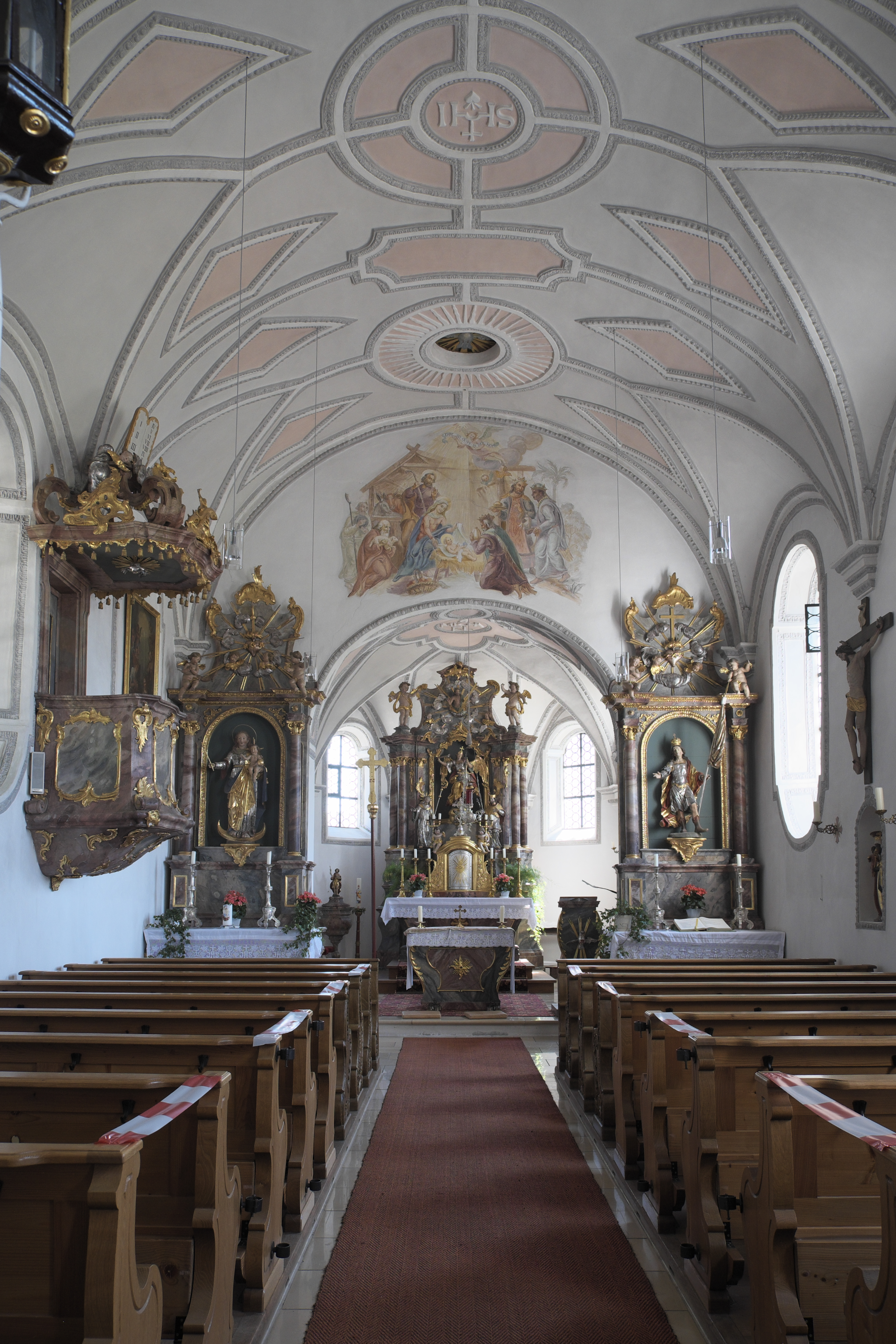 Katholische Pfarrkirche St. Michael in Wenigmünchen (Egenhofen) im oberbayerischen Landkreis Fürstenfeldbruck (Bayern/Deutschland), Innenraum; Blick zum Chor